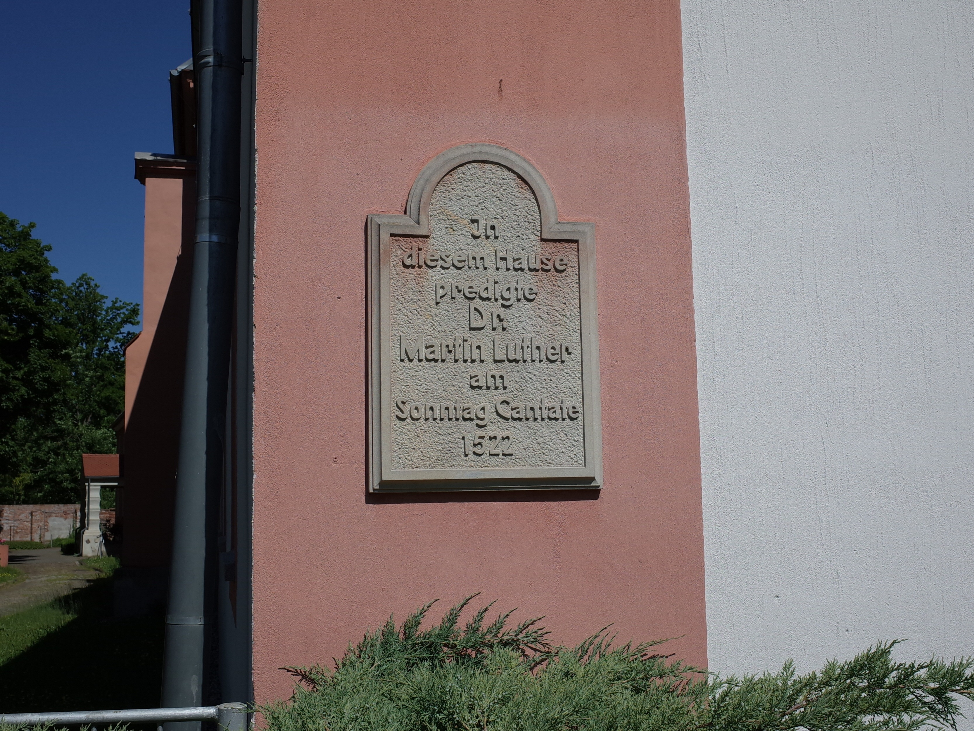 Zerbst/Anhalt, Am Plan 4, ehemaliges Augustinerkloster. Informationstafel am Kloster.